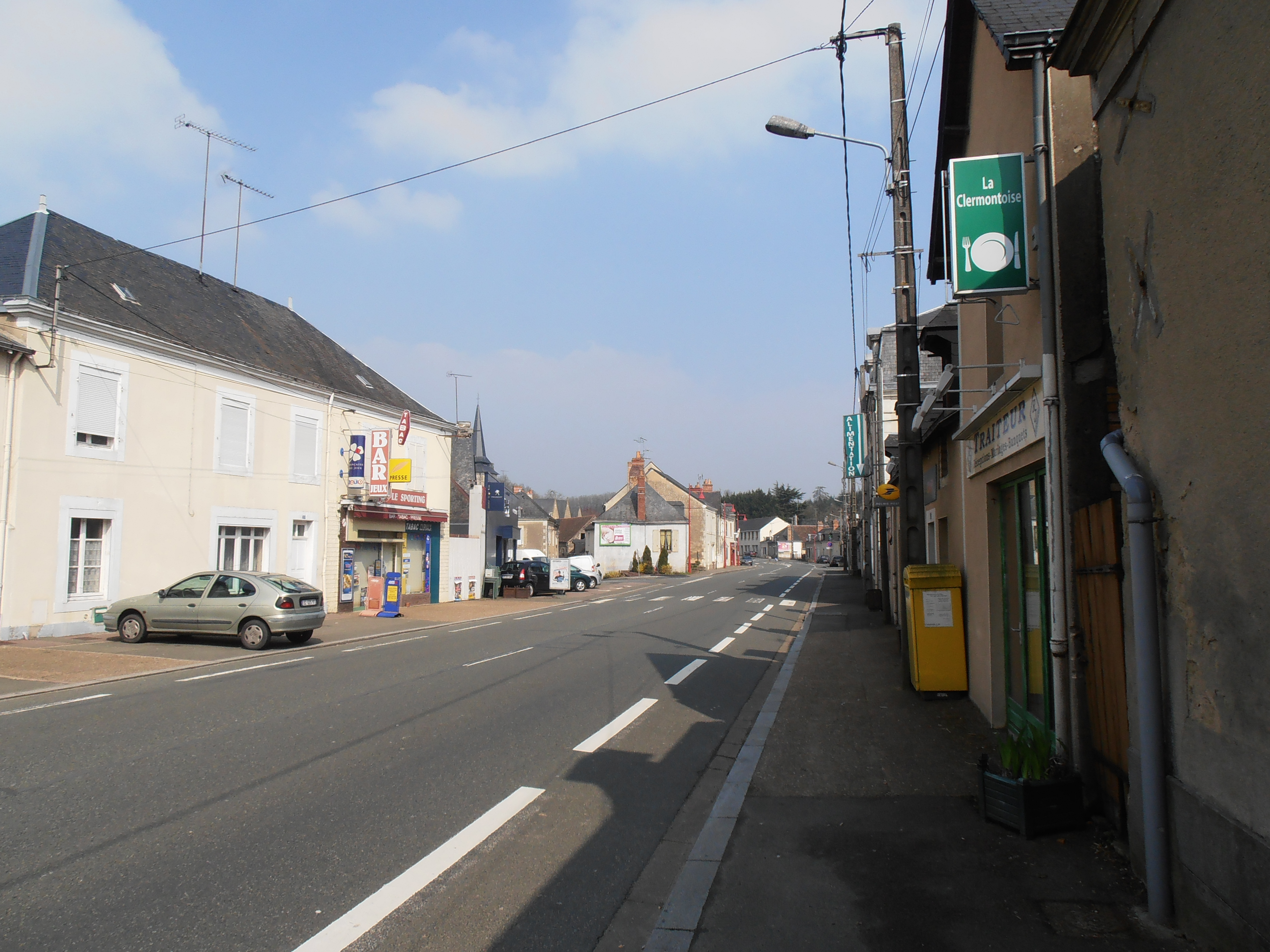 La route D323 traverse le village, c'est au bord de cette route que se trouvent tous les magasins du village.